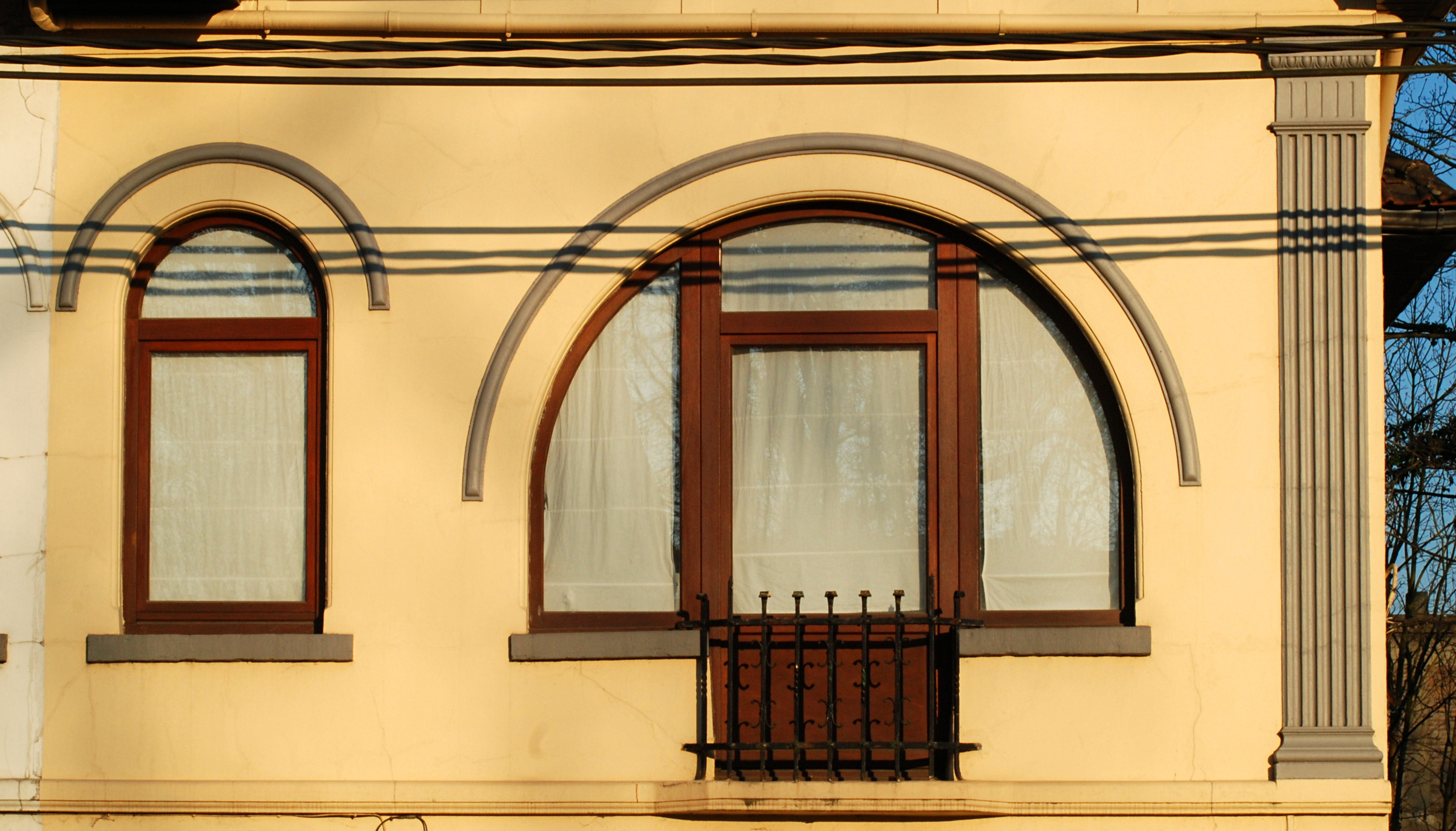 Belgique - Brabant wallon - Court-Saint-Étienne - Parc de Wisterzée - Maisons néo-classiques des ingénieurs des usines Henricot